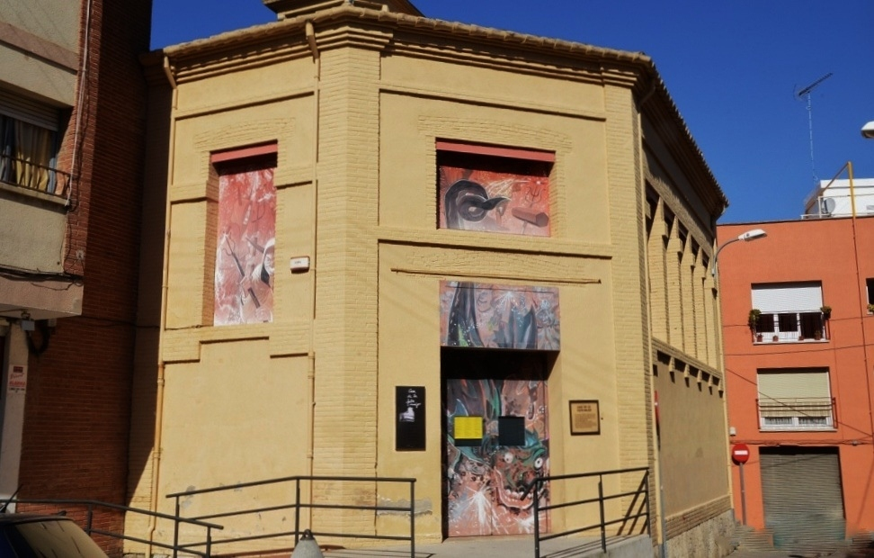 Mercat de Gallines i Menuts (Vilafranca del Penedès)